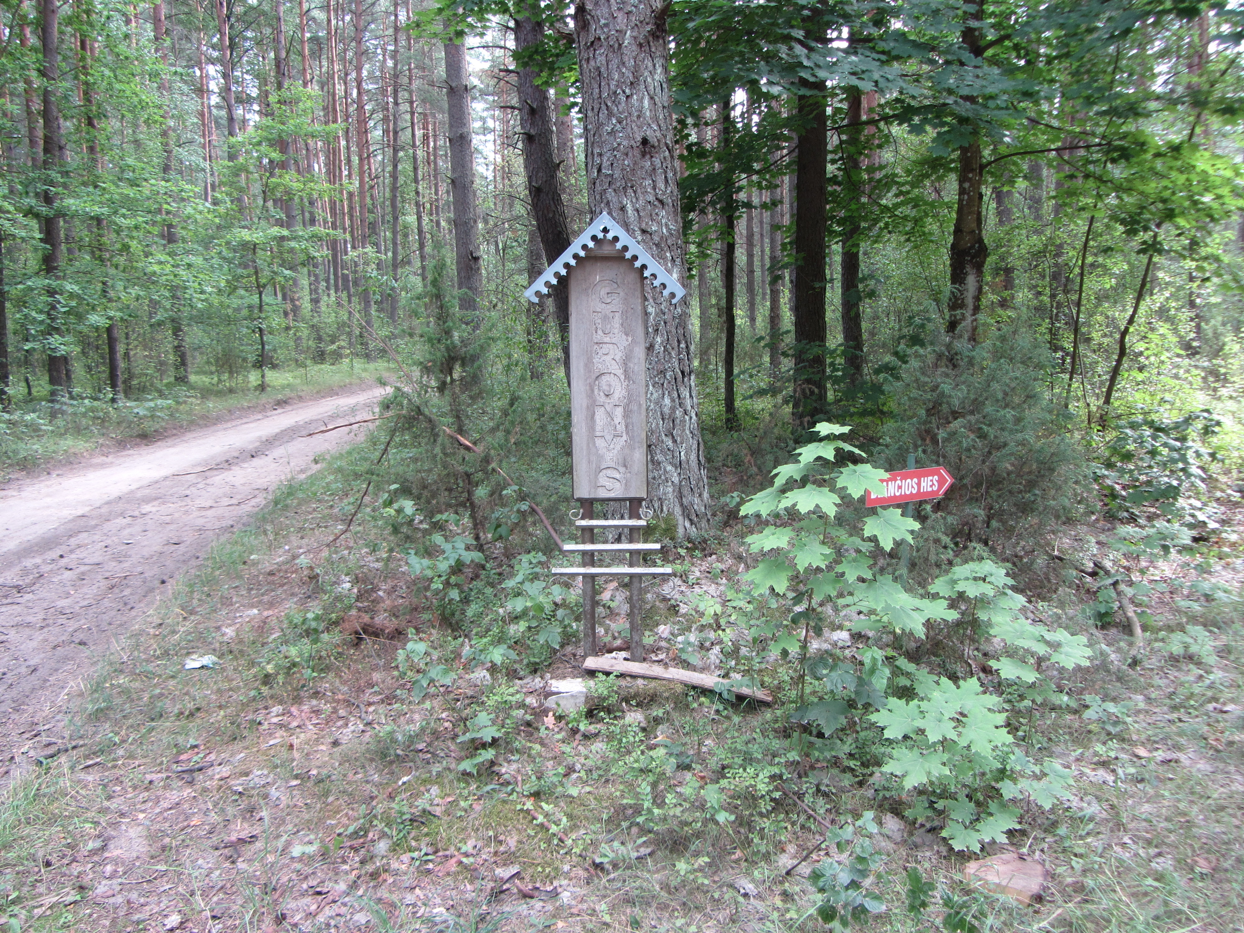 Leipalingio sen., Lithuania